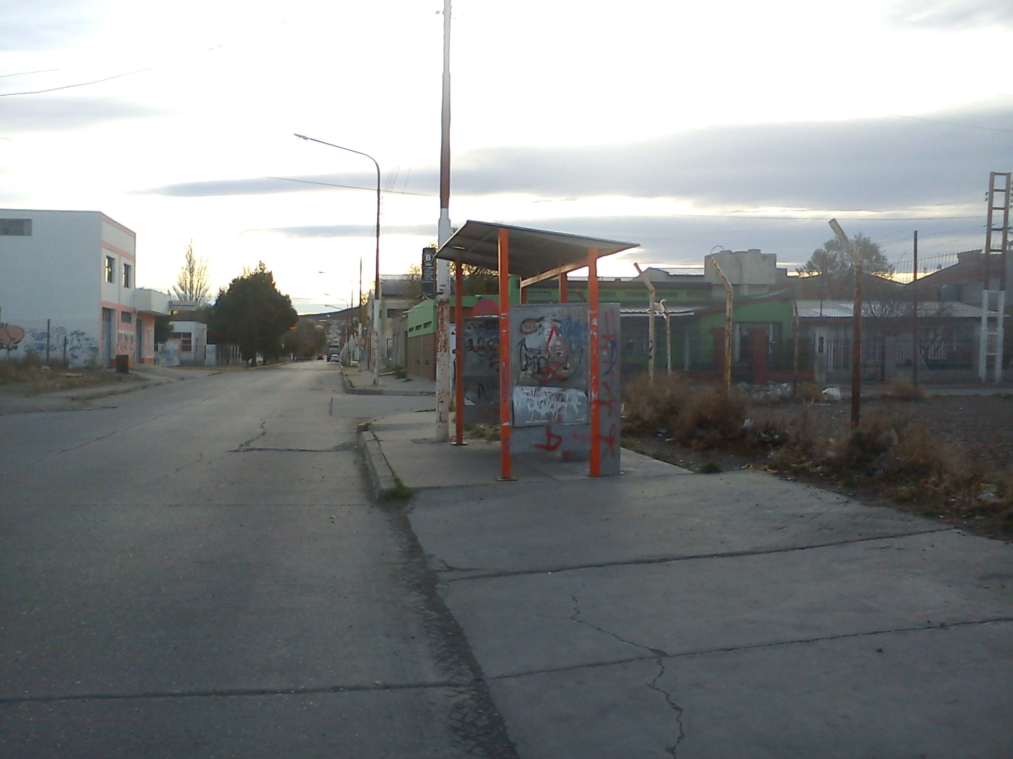 Parada de Autobuses Caleta Olivia